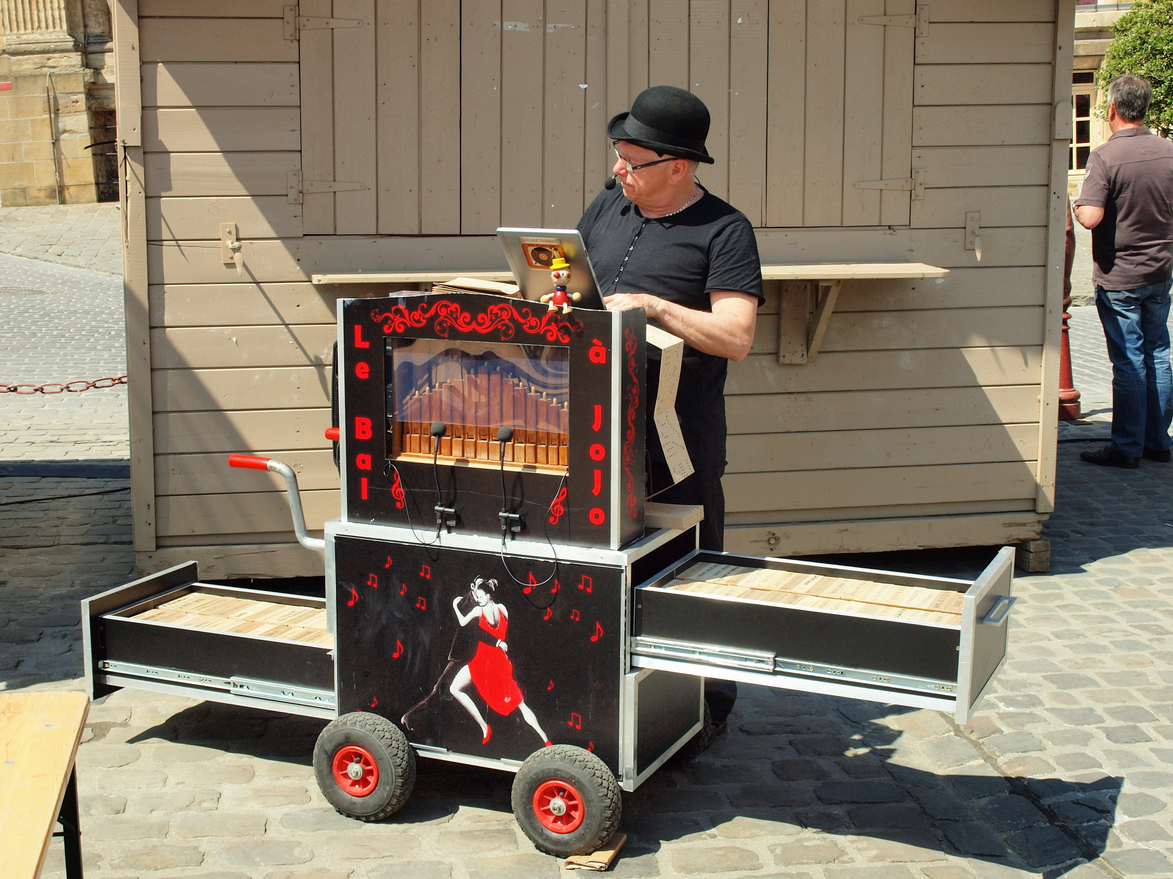 Place Ducale de Charleville-Mézières (Ardennes, France) , en mai 2016, lors du 13e festival des Confréries en Ardenne.